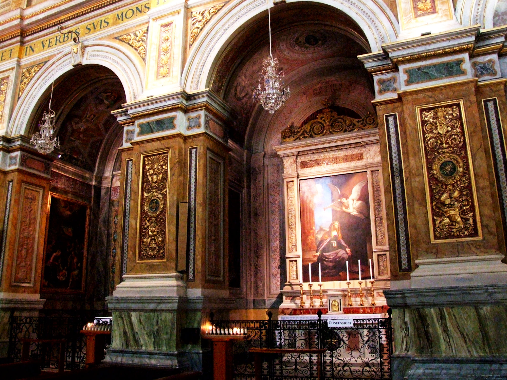 Basilica di San Nicola da Tolentino, Tolentino, Italy